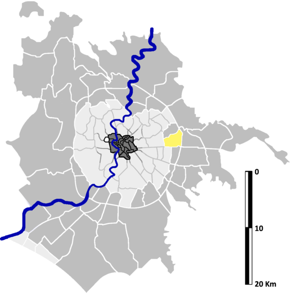 Tor Sapienza